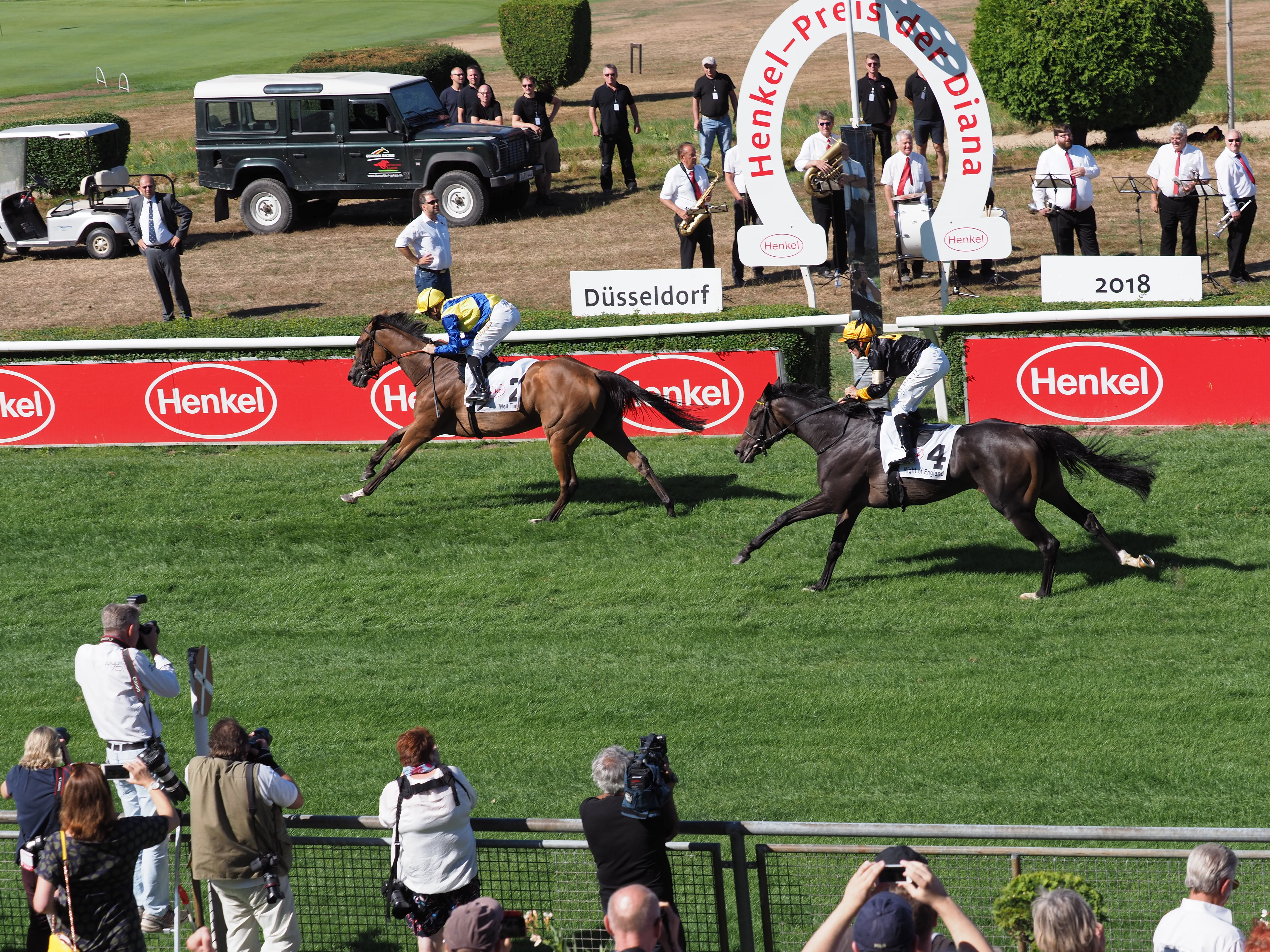 Preis der Diana 2018: Well Timed und Night of England überqueren die Ziellinie